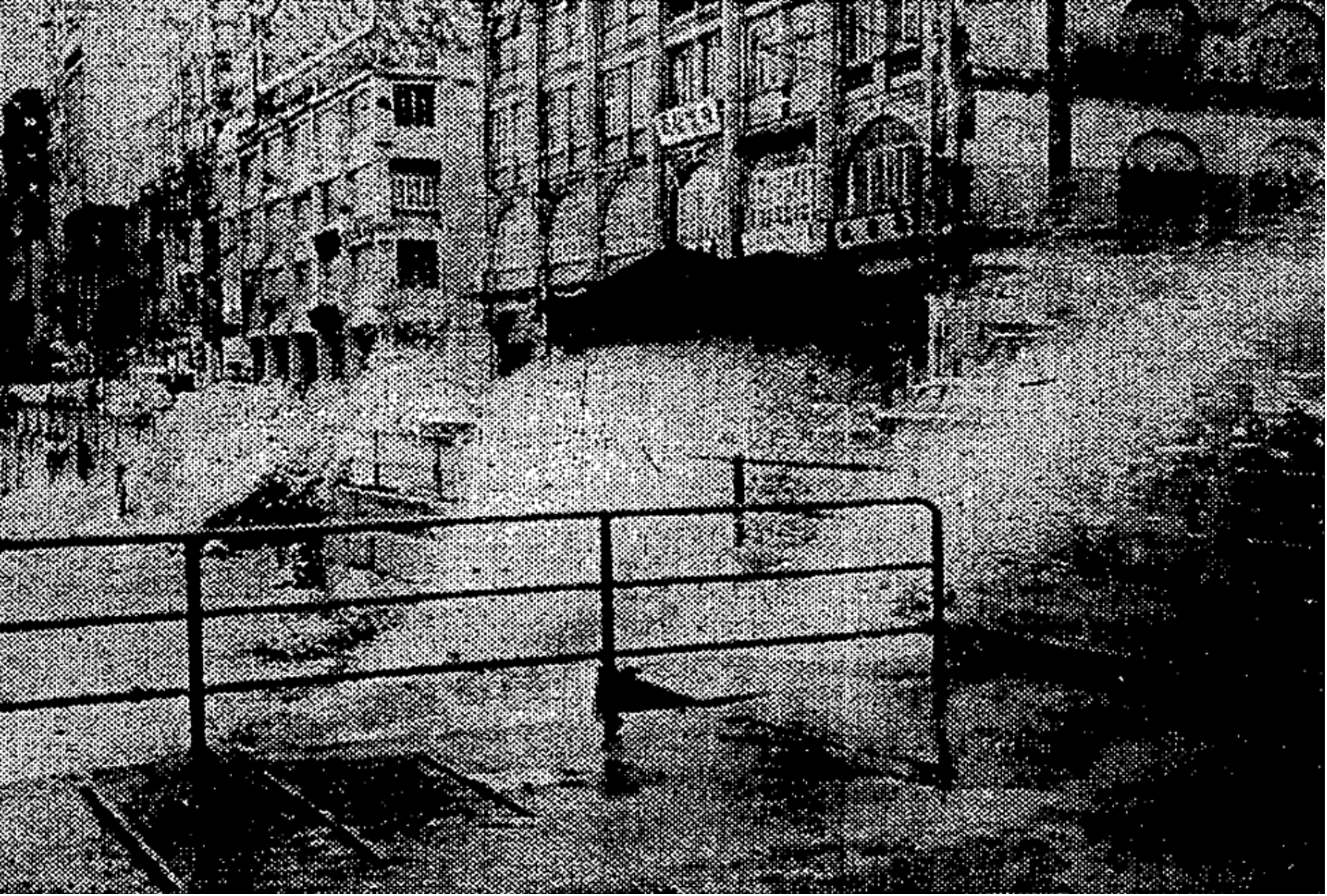 中文（香港）: 颱風愛麗斯正面吹襲香港，十號颶風信號正在懸掛，中環統一碼頭附近大浪拍打岸邊。